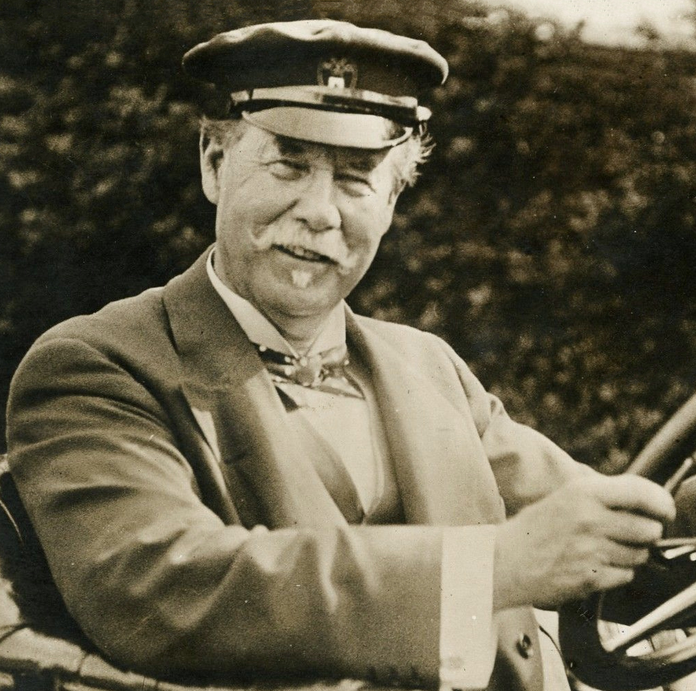 "Sir Thomas LIPTON qui vient de mourir 1931" Photo originale G.DEVRED / Agce ROL